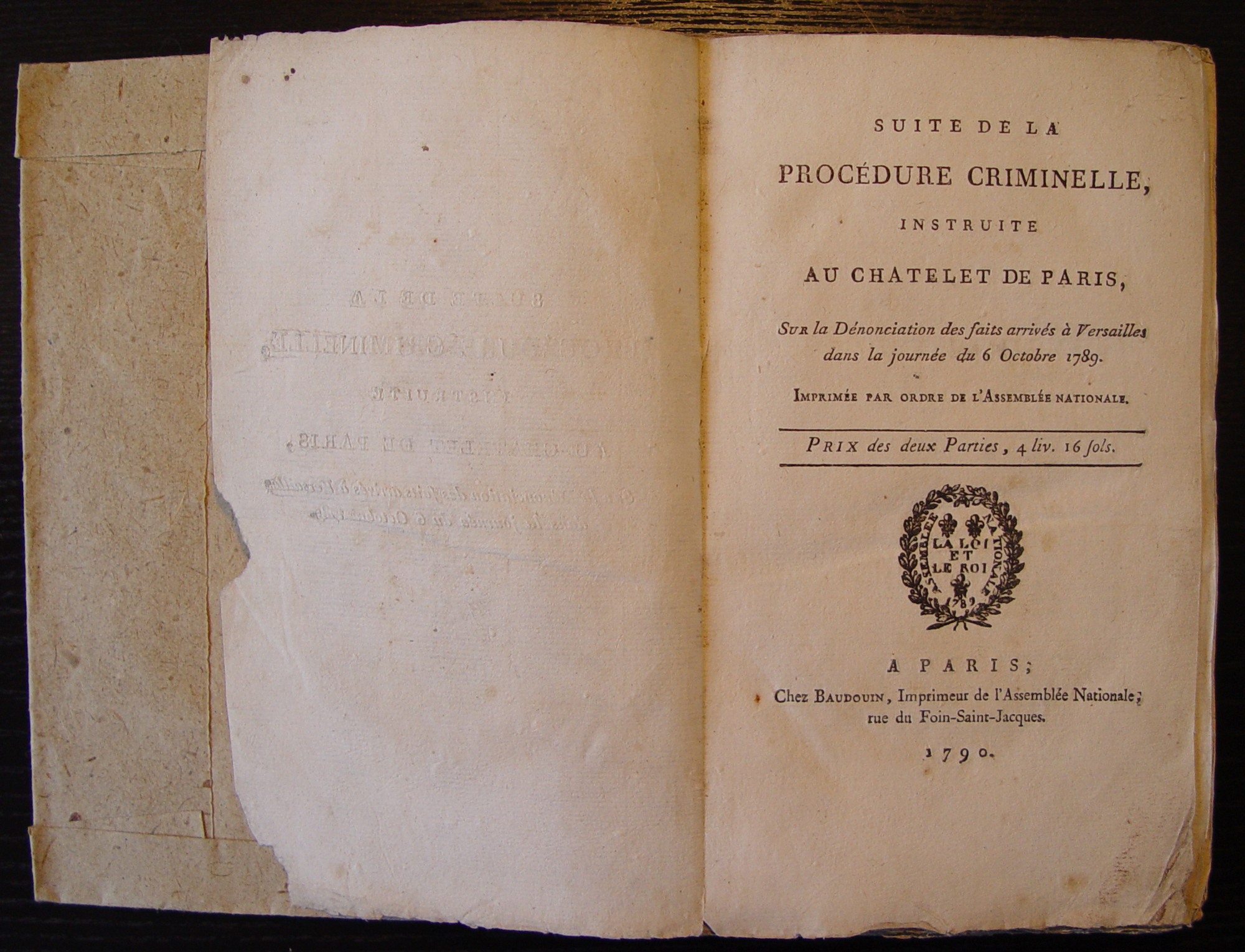 Dortmund/ Germany, Collection Louis de France, Publications, CLdf-PB0002, Paris 1790: Suite de la procédure criminelle instruite au Châtelet de Paris, Sur la Dénonciation des faits arrivés à Versailles dans la journée du 6 Octobre 1789, Tomé II./III.